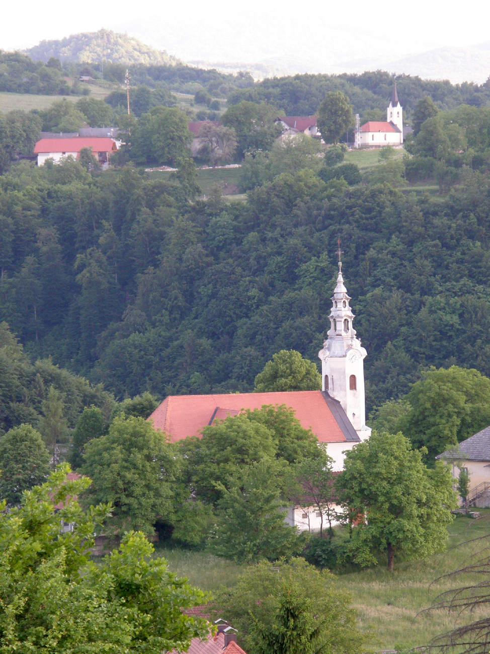 Stopiče: Cerkev Marije Device Tolažnice žalostnih. V ozadju Gornja Težka Voda in hrib Breznik. Pogled iz Verduna.